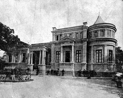 Casa de Pinheiro Machado - Rio de Janeiro - Brazil